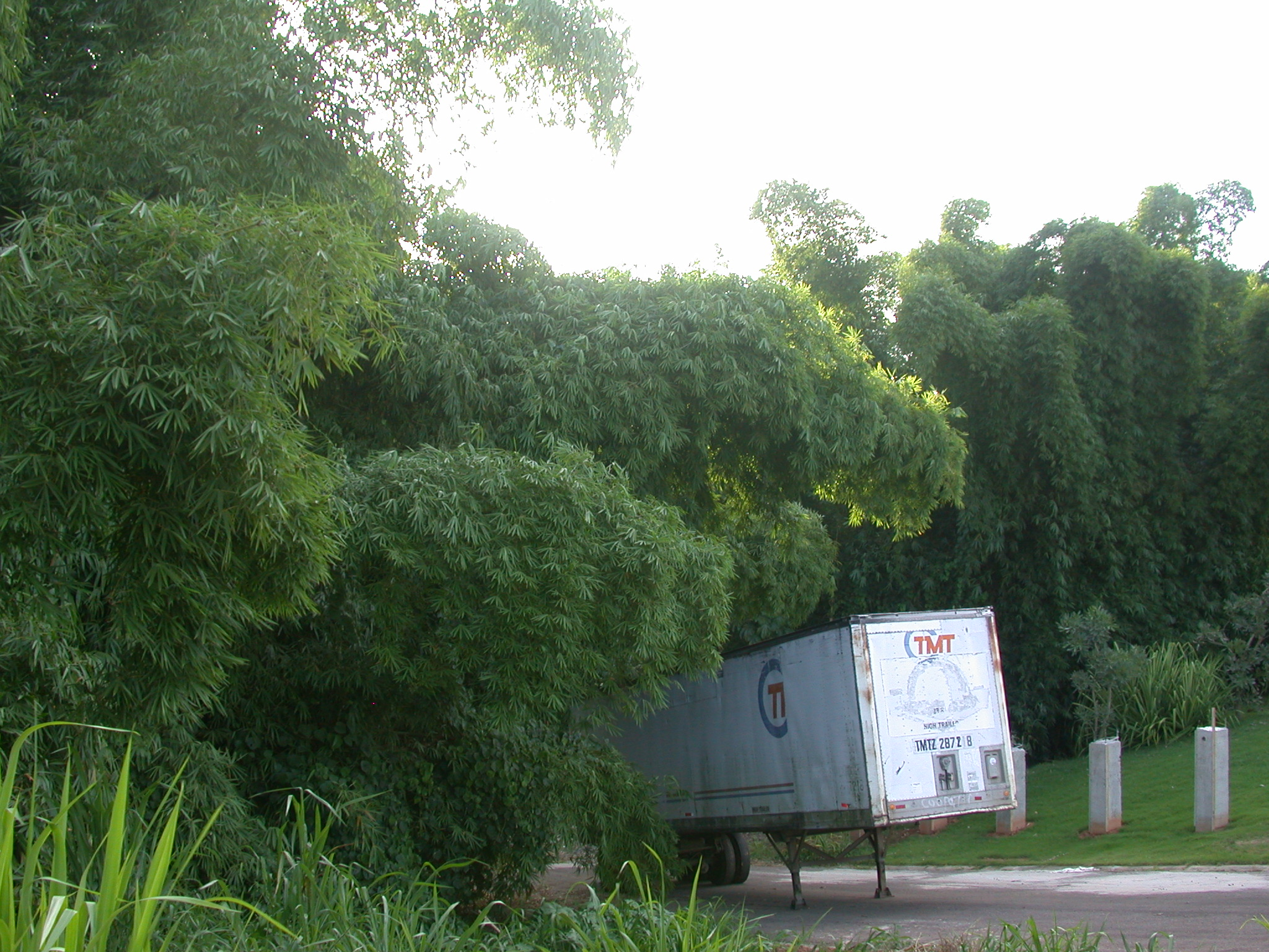 Bamboo forest near Mayaguez, Puerto Rico